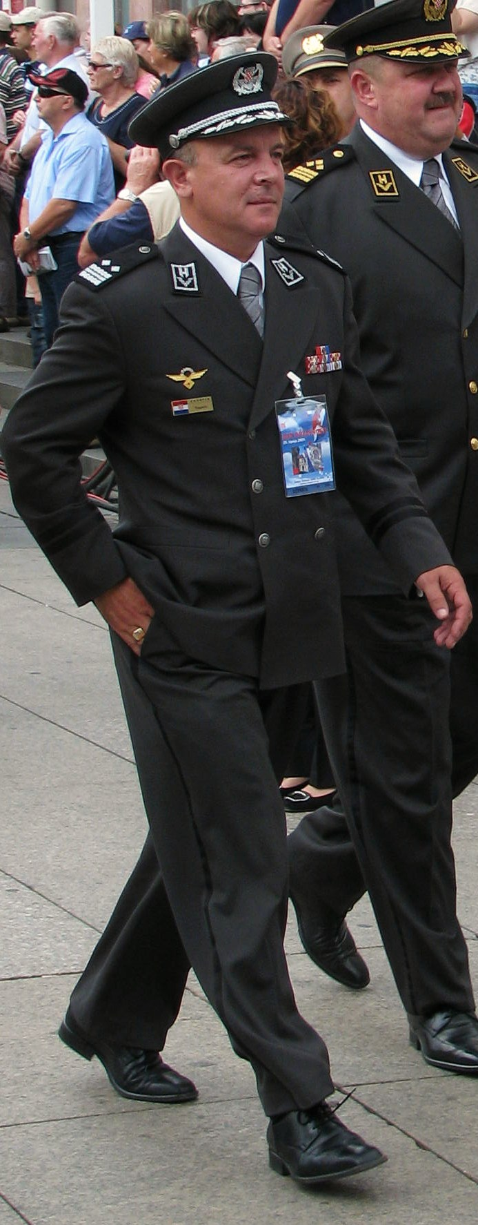 Vlado Bagarić